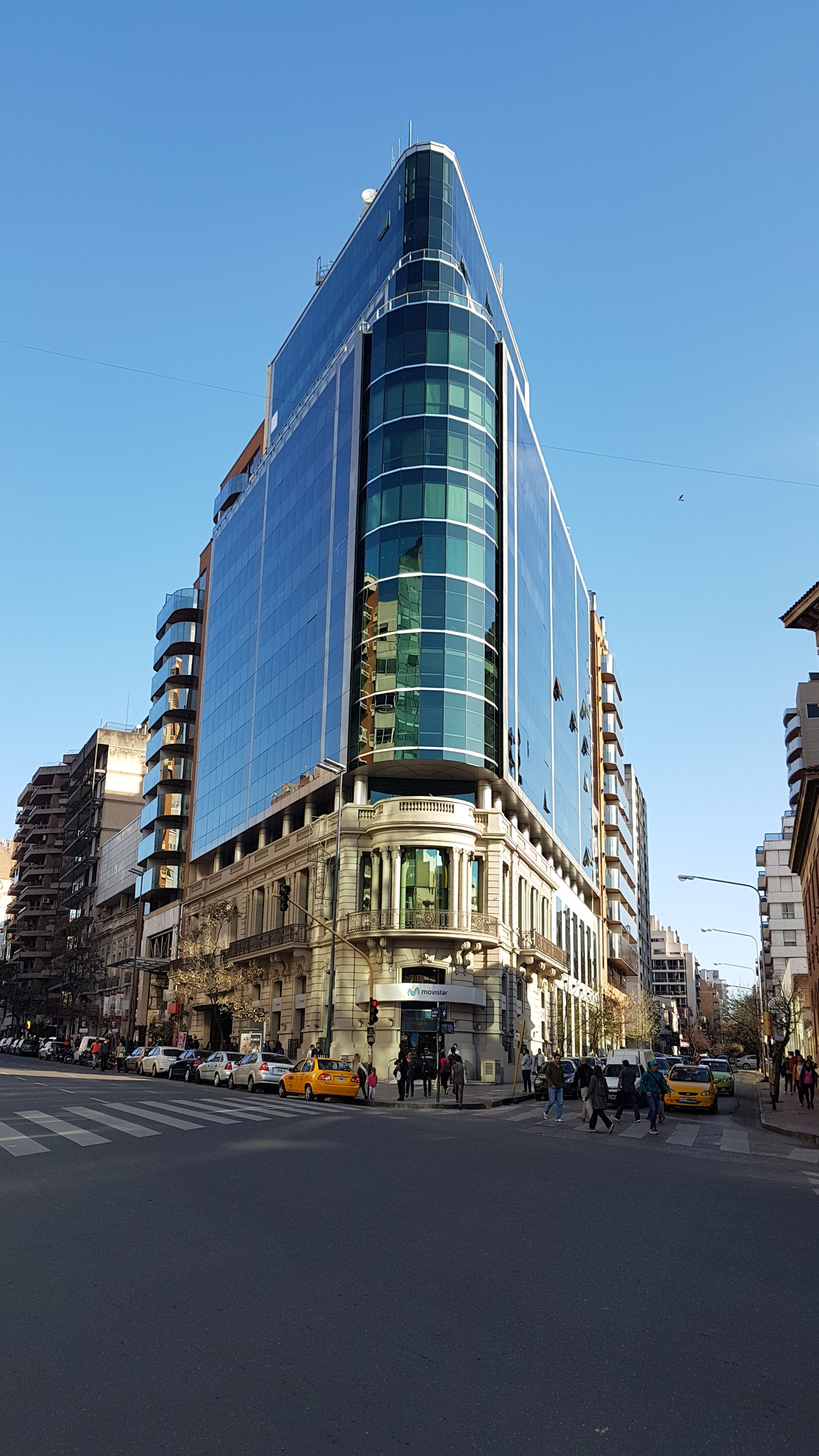 Ecipsa Tower